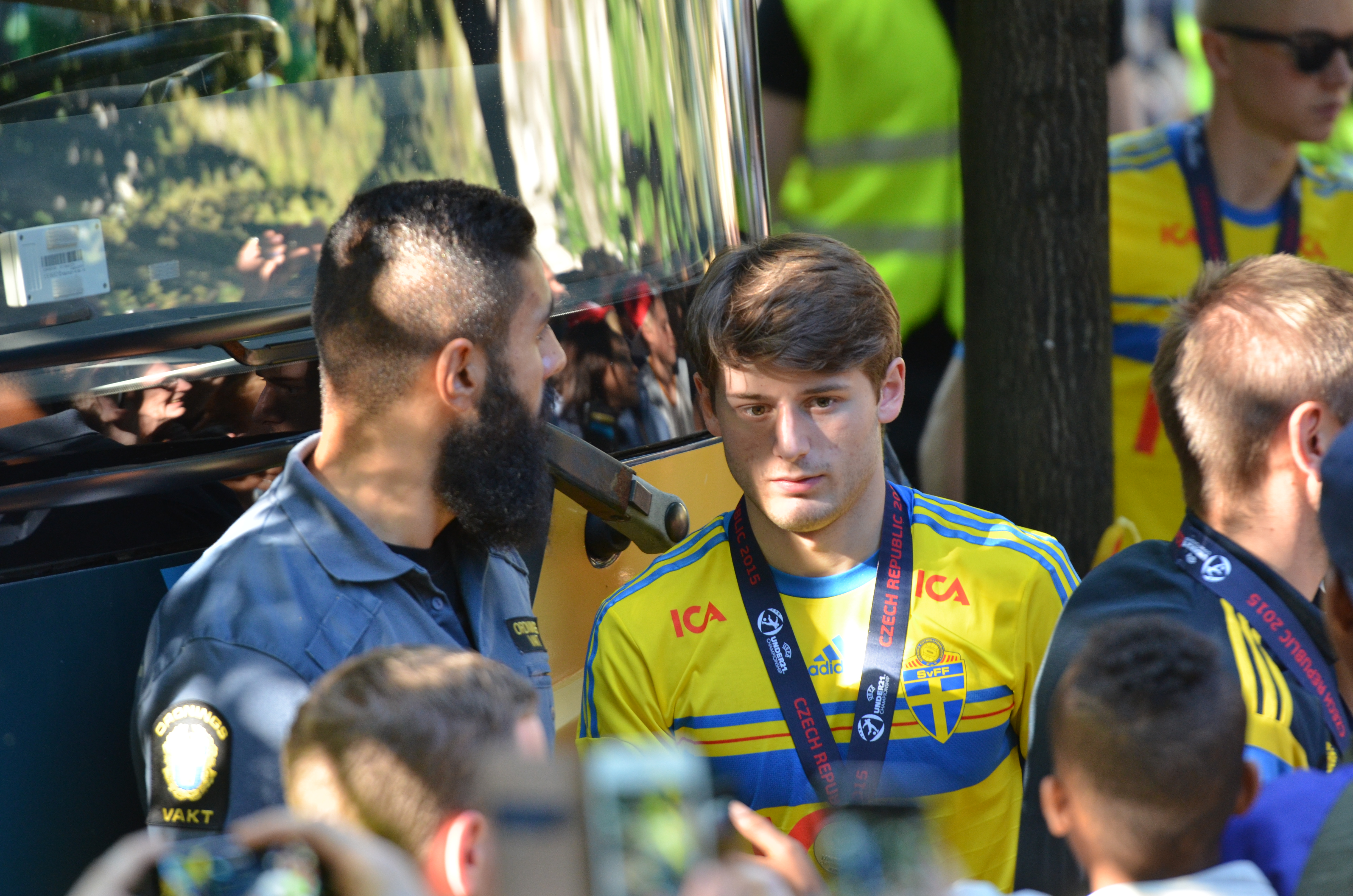 Firande av U21 EM-guldet, efter en bussresa genom Stockholm till Kungsträdgården där det var underhållning och lagpresentation avslutade spelarna med att skriva autografer och ta bilder tillsammans med fans.